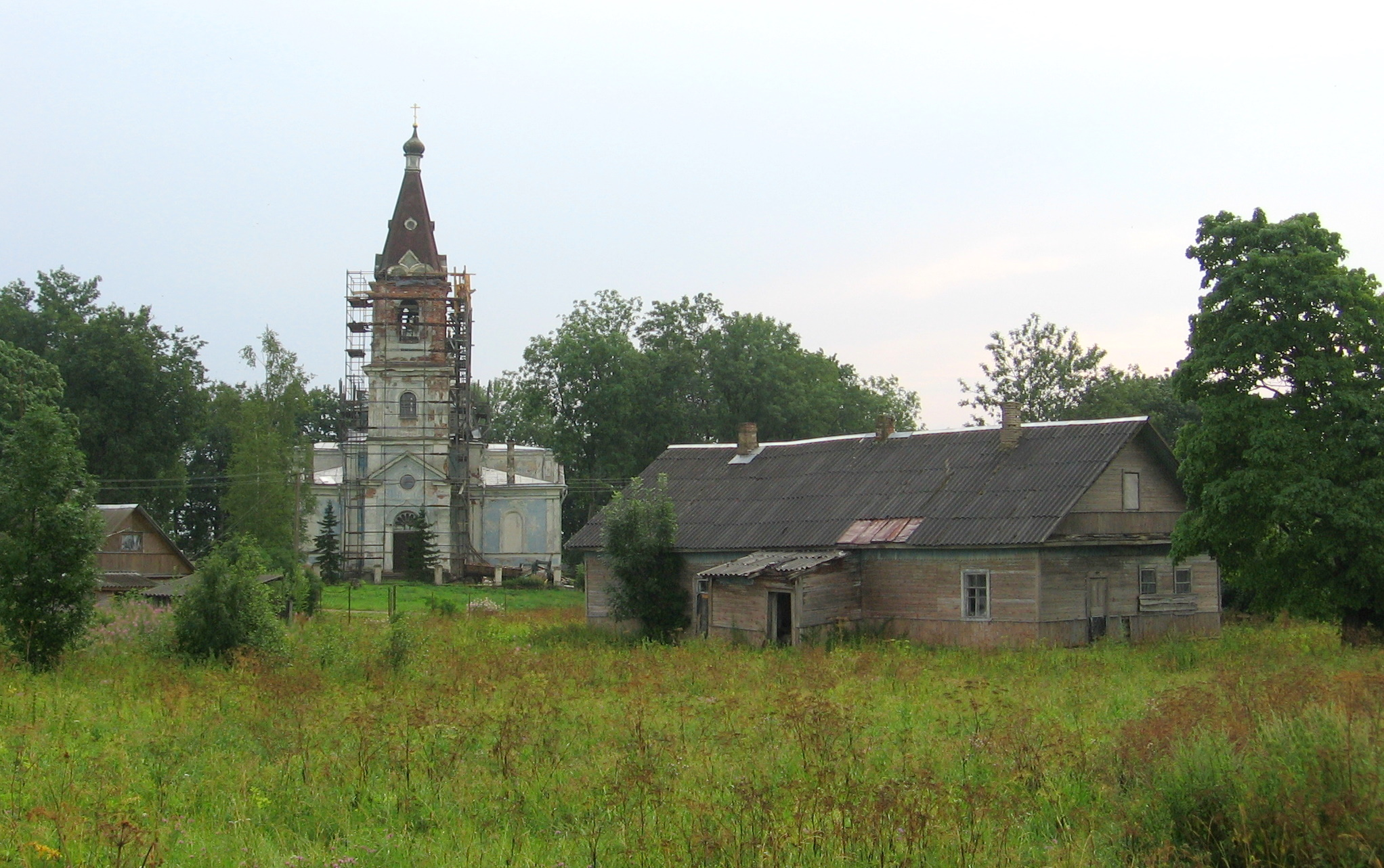 В деревне Ильеши